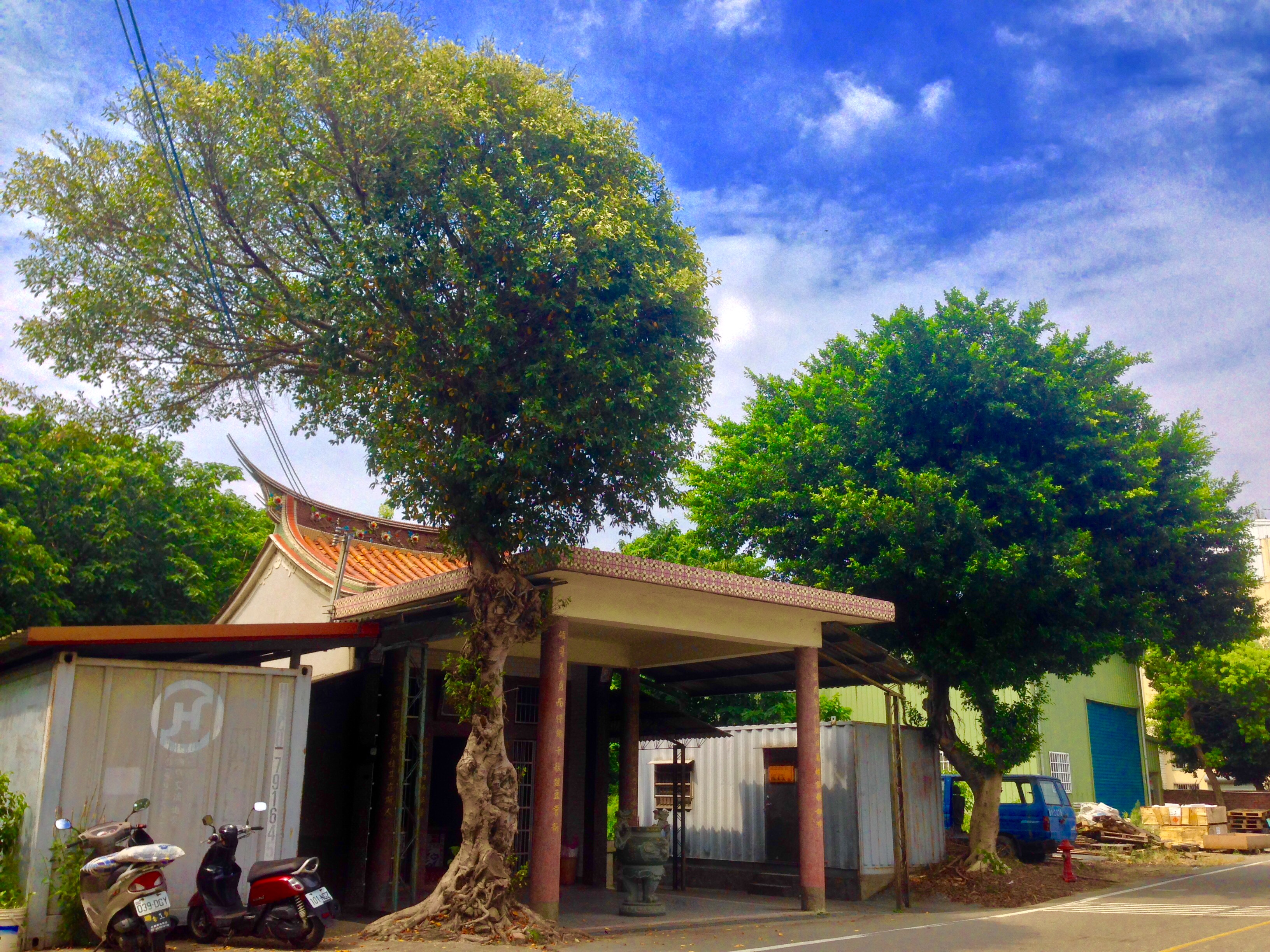 中文（台灣）: 楊統領廟一景